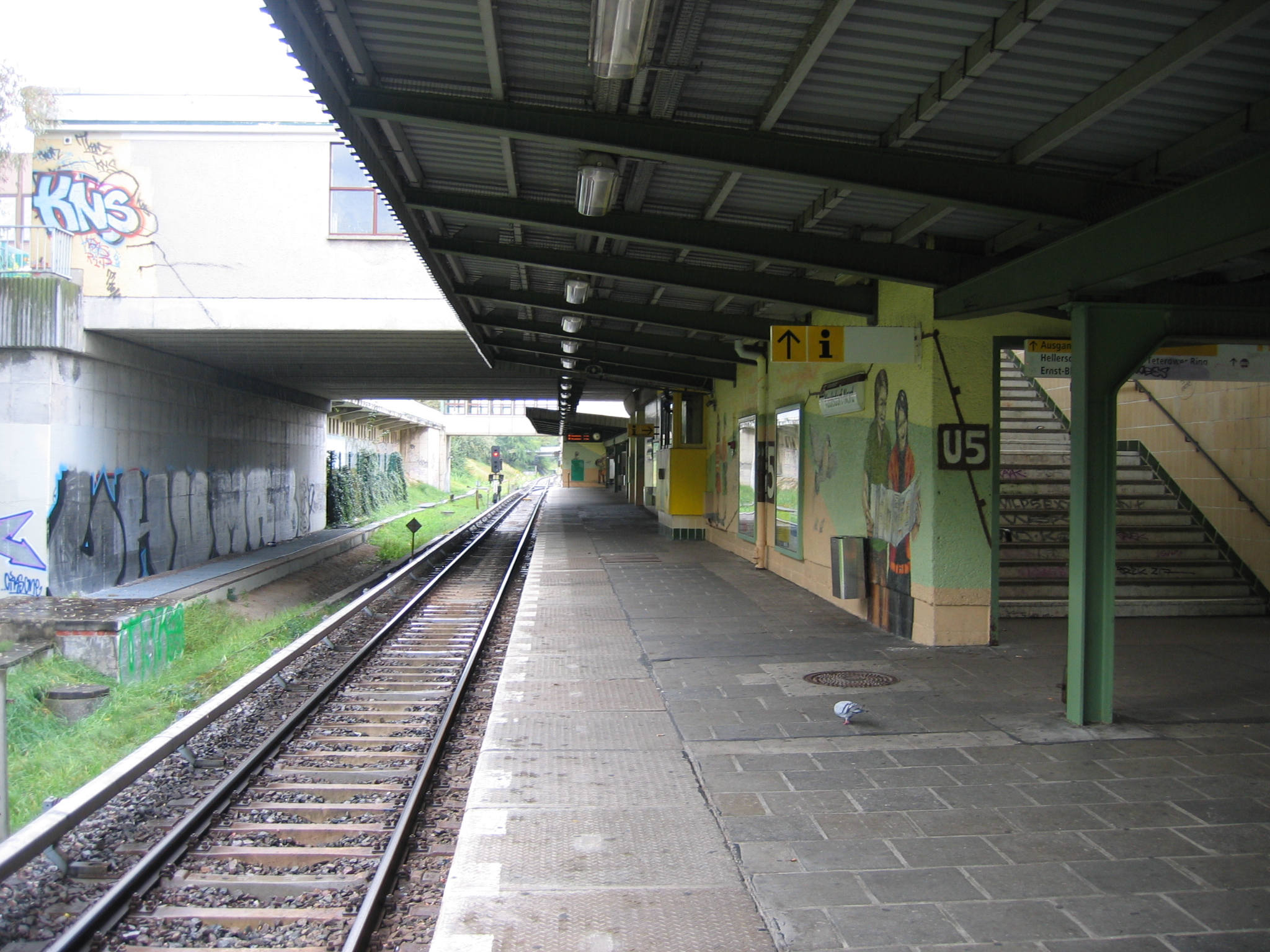 U-Bahnhof Kaulsdorf Nord, Berlin